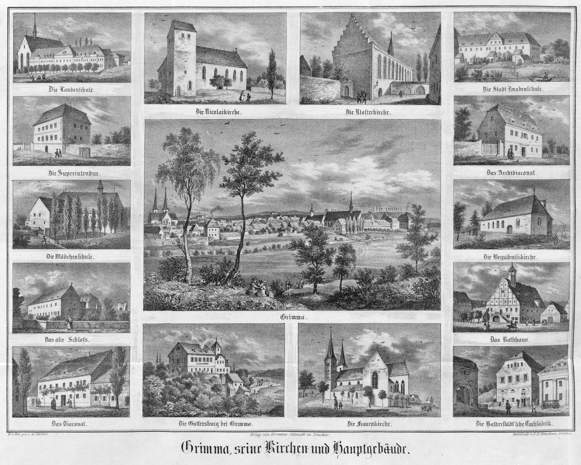 Grimma, seine Kirchen und Hauptgebäude